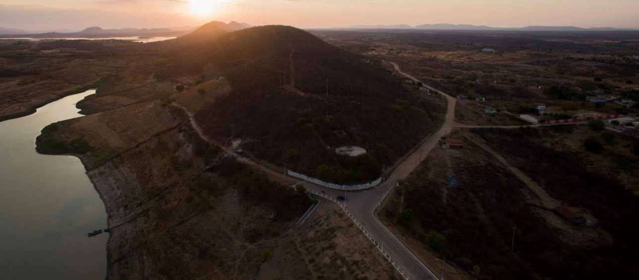 Ponto Tursitico